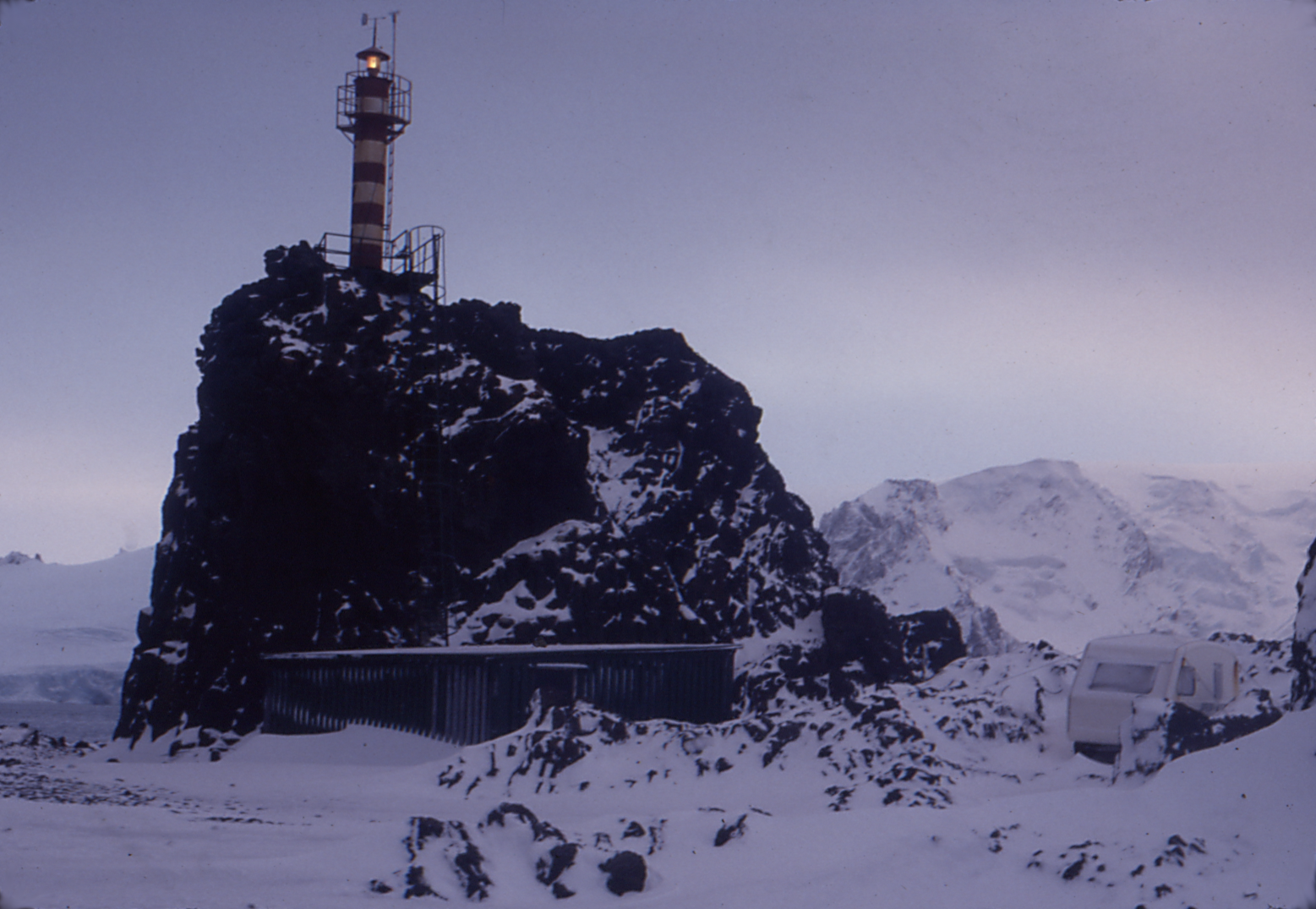 Faro de la Base Henryk Arctowsk en 1985